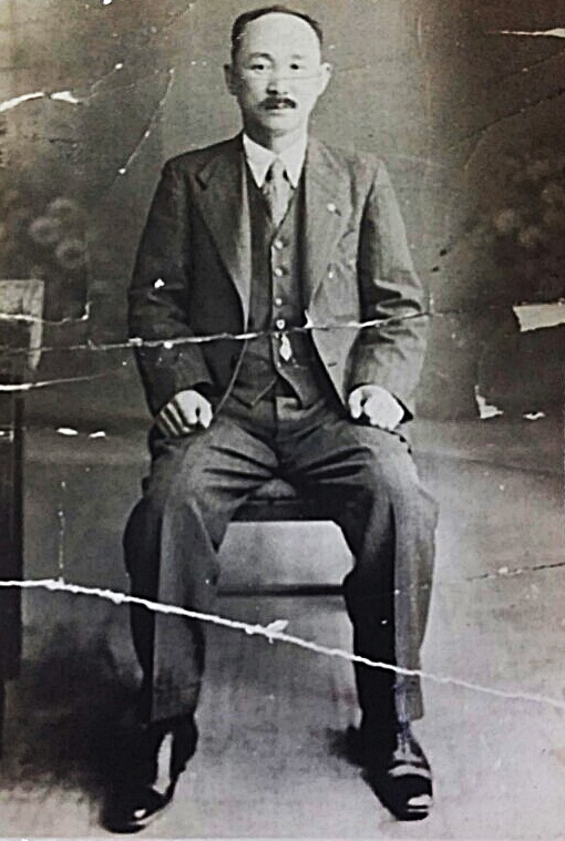 독립운동가 이억근.